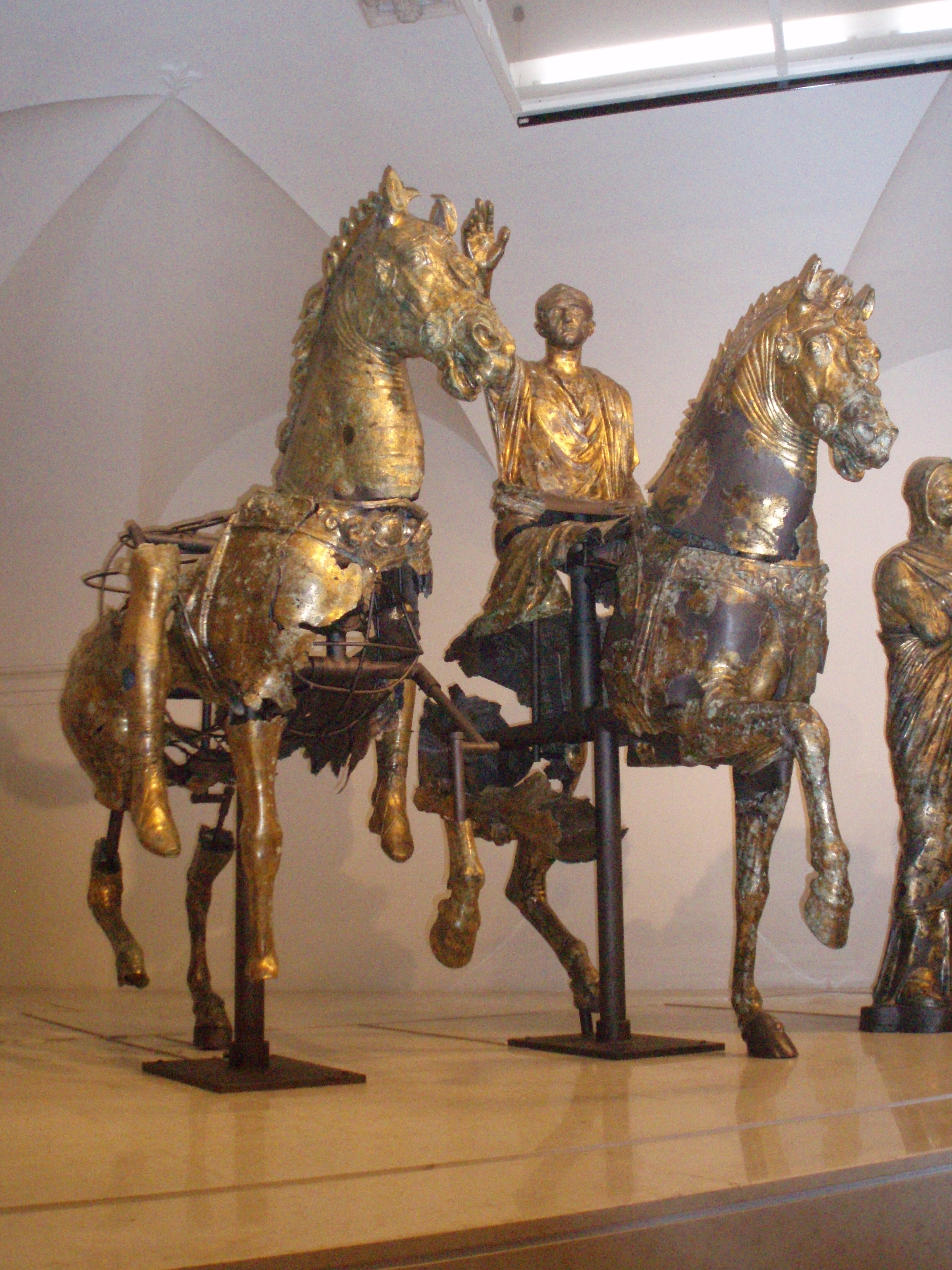 Bronzi dorati da Cartoceto di Pergola - 07